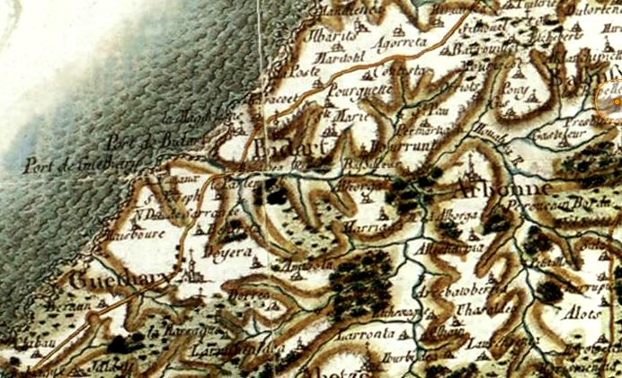 Représentation de Bidart sur la carte de Cassini